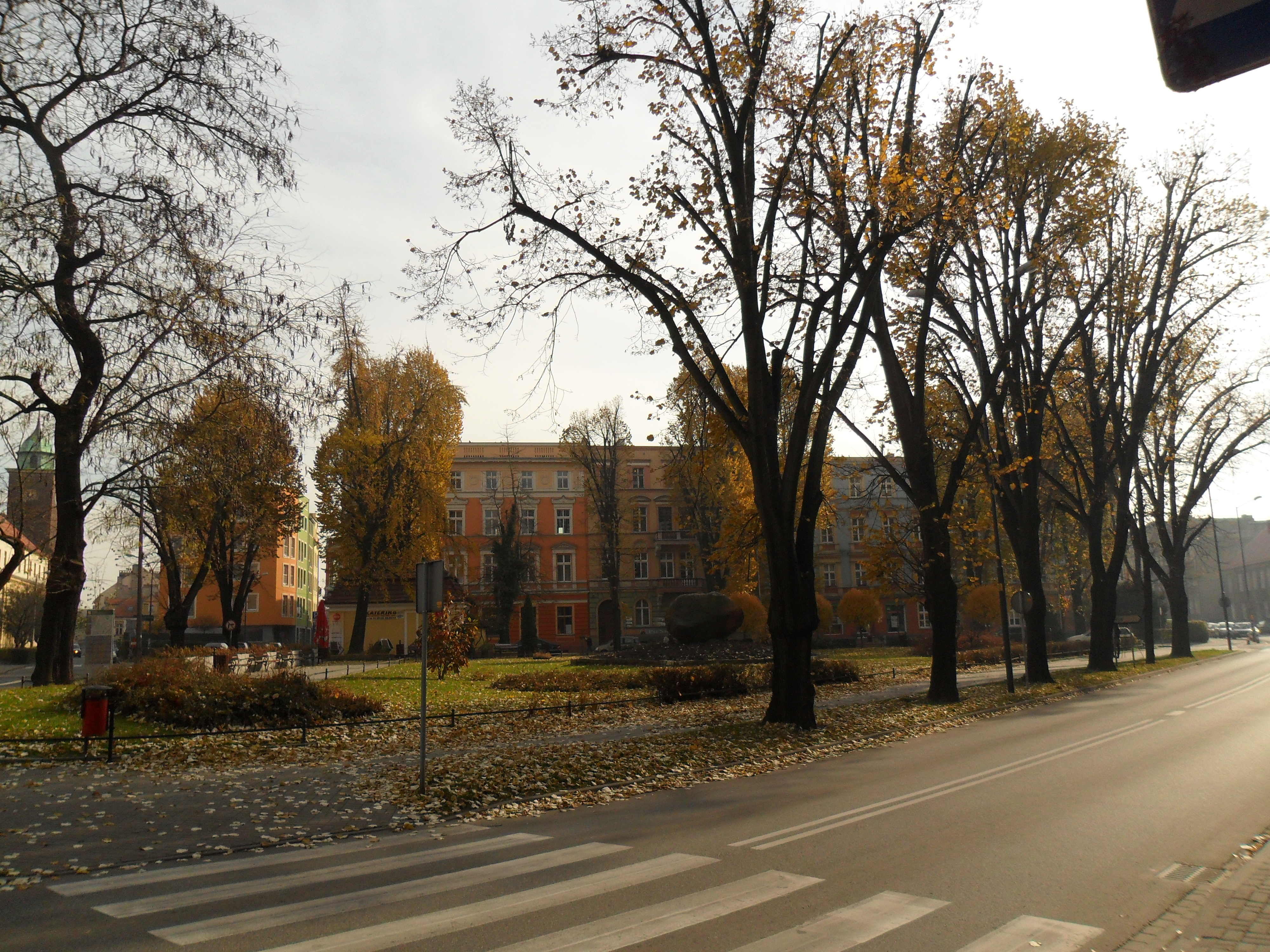 Plac Wolności w Raciborzu jesienią